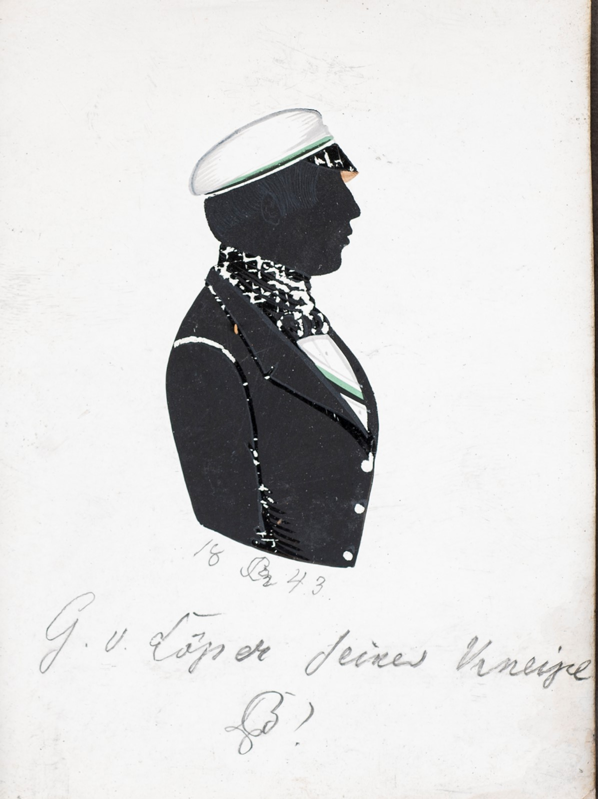 Schattenriss von stud. iur. Gustav von Loeper als Corpsbursche der Saxo-Borussia Heidelberg